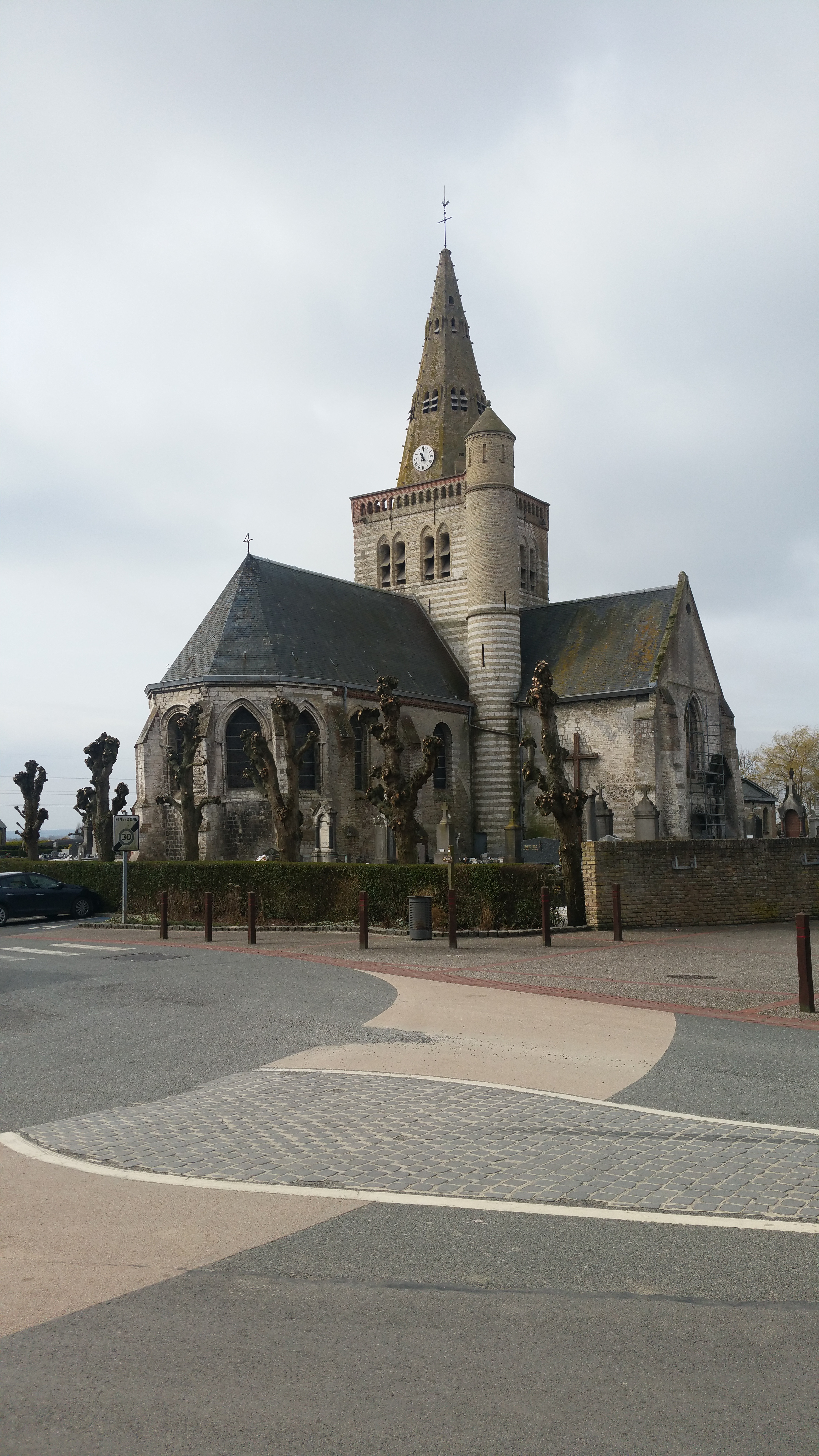 Vue de l'église Saint-Jacques-le-Majeur de Cappelle-Brouck. .